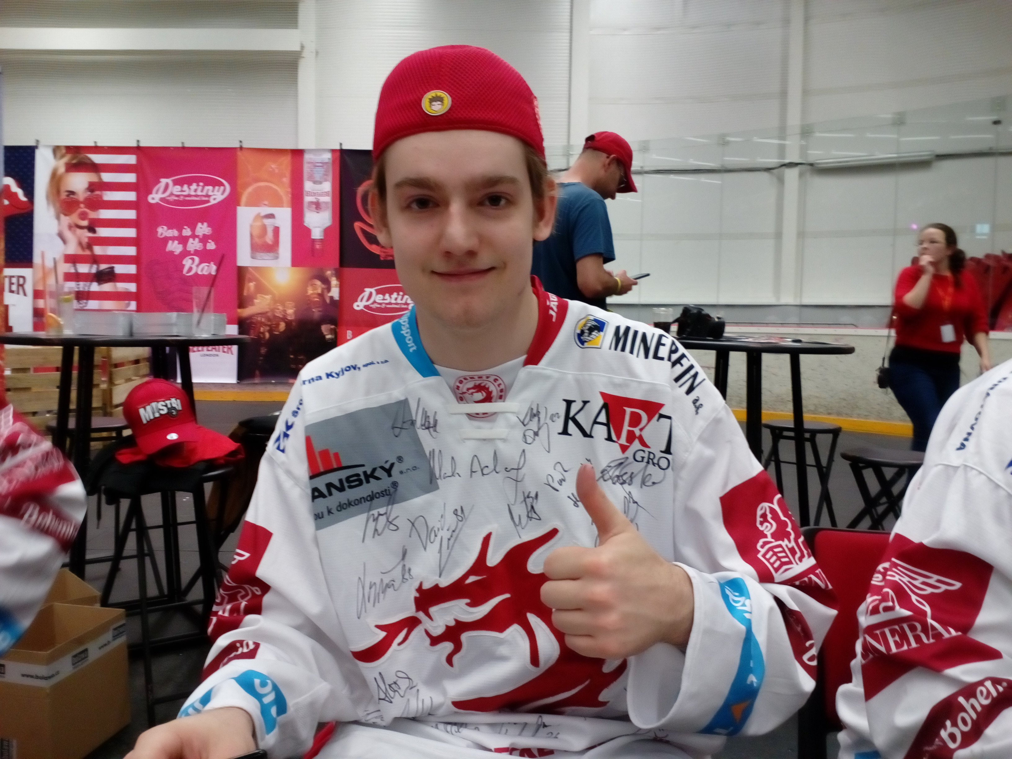 Po zakončení sezóny 2018/19 na autogramiádě v malé (tréningové) Werk Areně